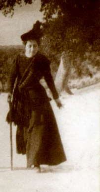 María Goyri en su viaje de novios por la ruta del Cid